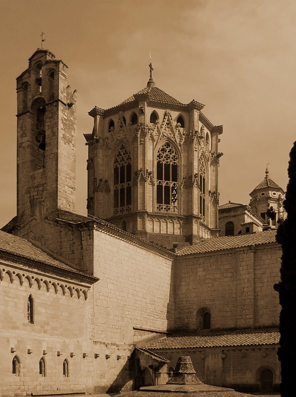 Monasterio de Poblet, Cataluña, España.